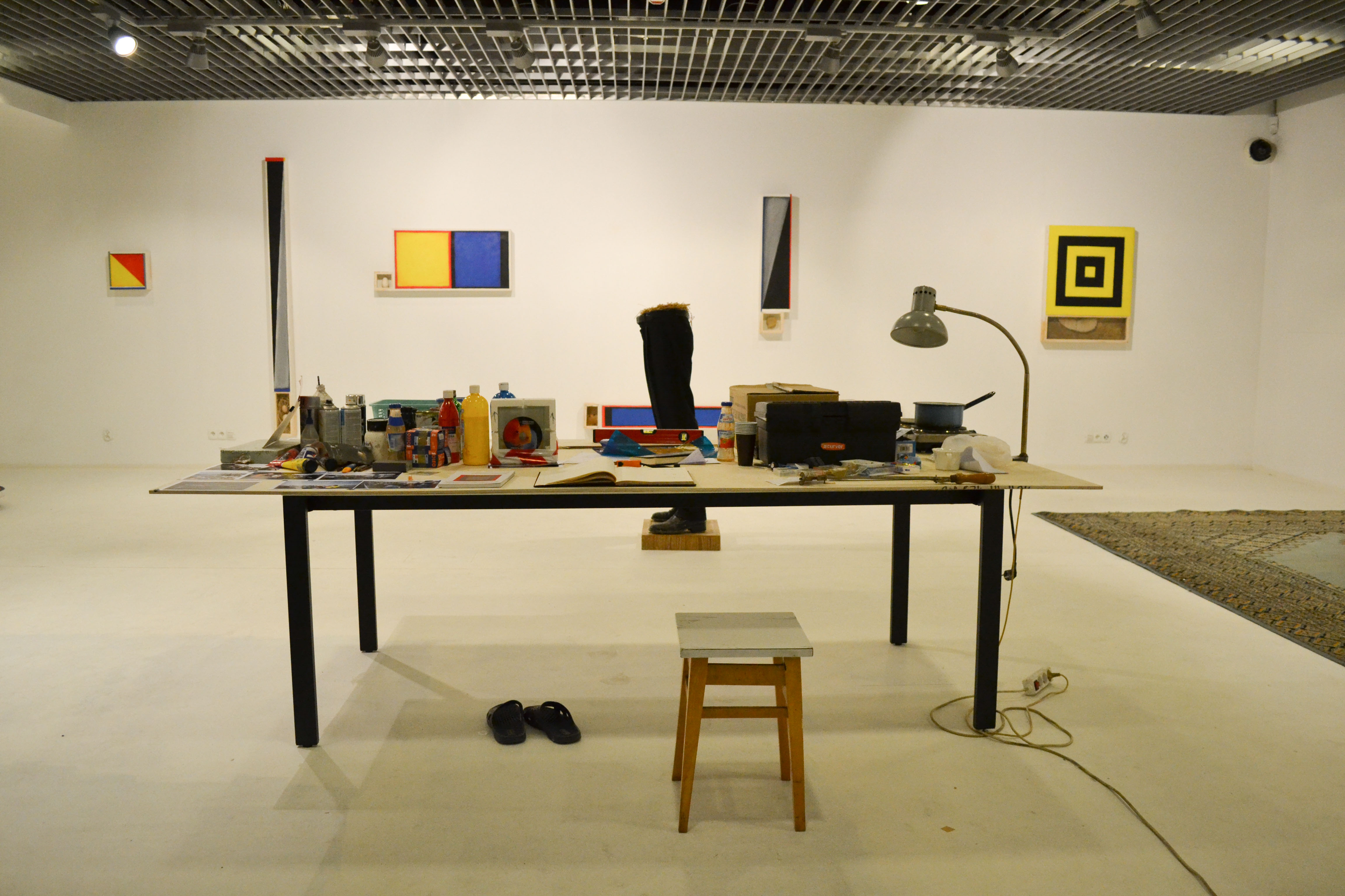 MCSW Elektrownia - Piotr Lutyński "Amerykanski sen"